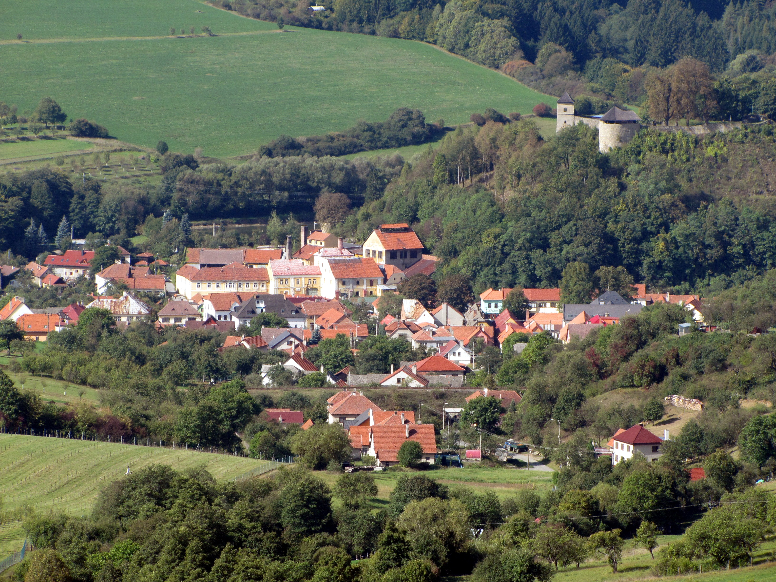 Brumov, okres Zlín